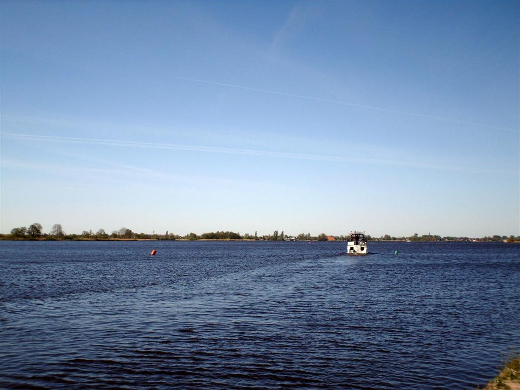 Langweerderwielen (lake)